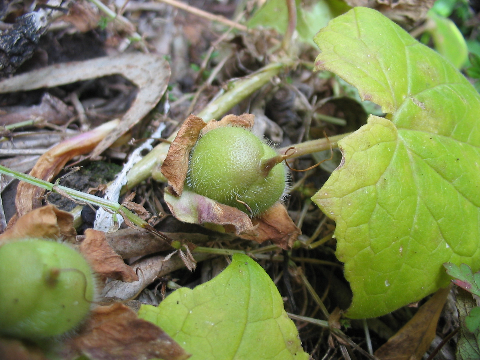 Kletter-Gloxinie (Lophospermum erubescens) - Fruit